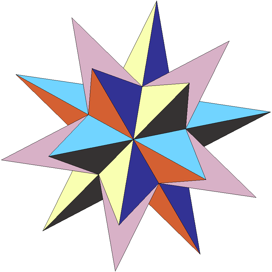 Третья звёздчатая форма додекаэдра.